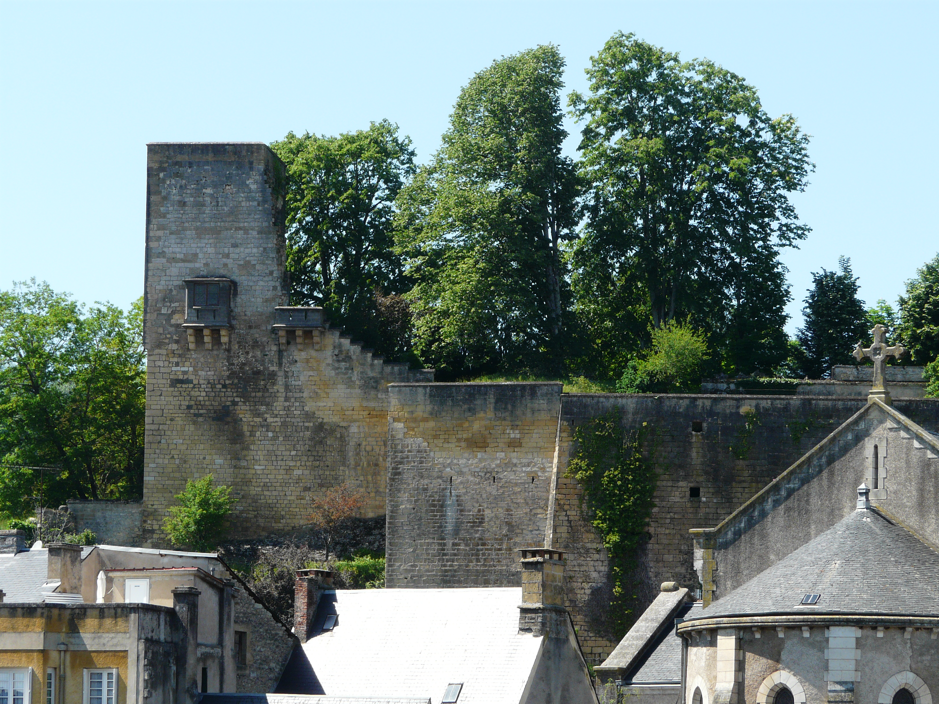 Le château de Montignac, Dordogne, France.